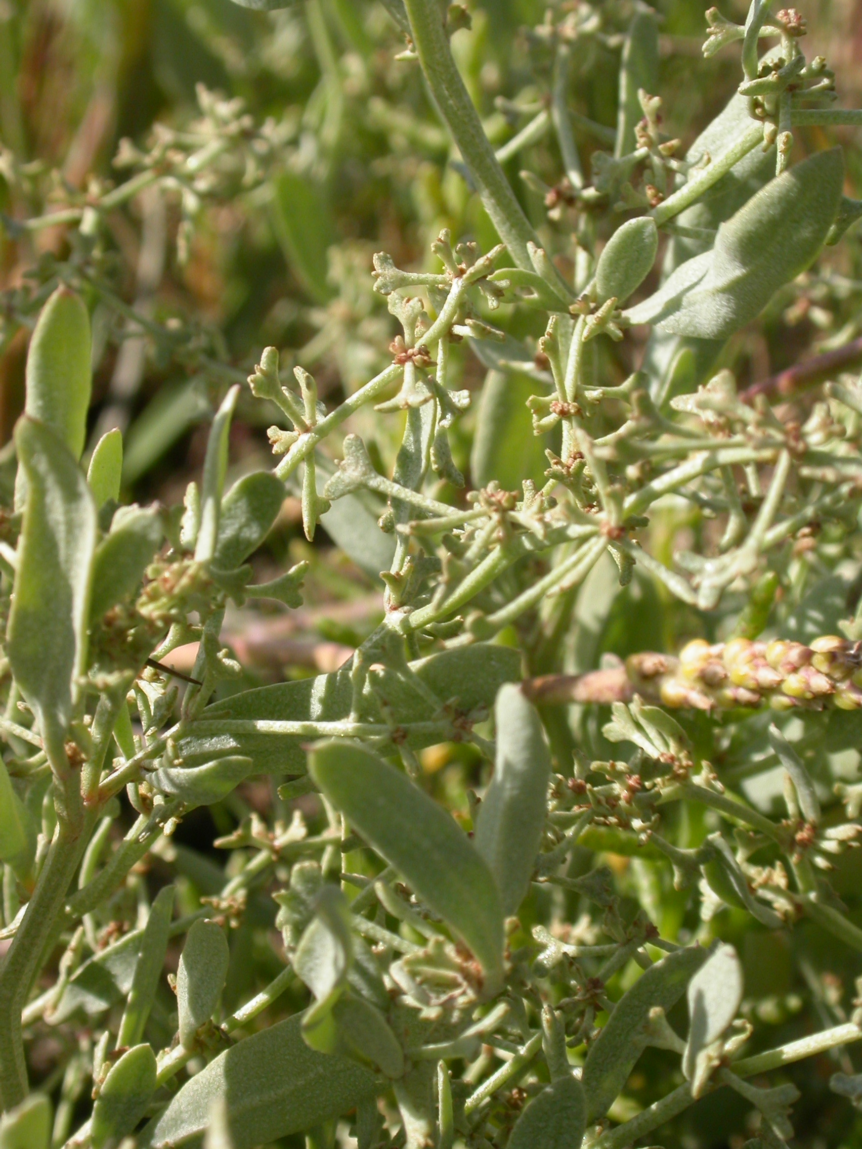 Halimione pedunculata (L.) Aell. ( Atriplex pedunculata L.) dans le département de la Somme (Baie d'Authie).